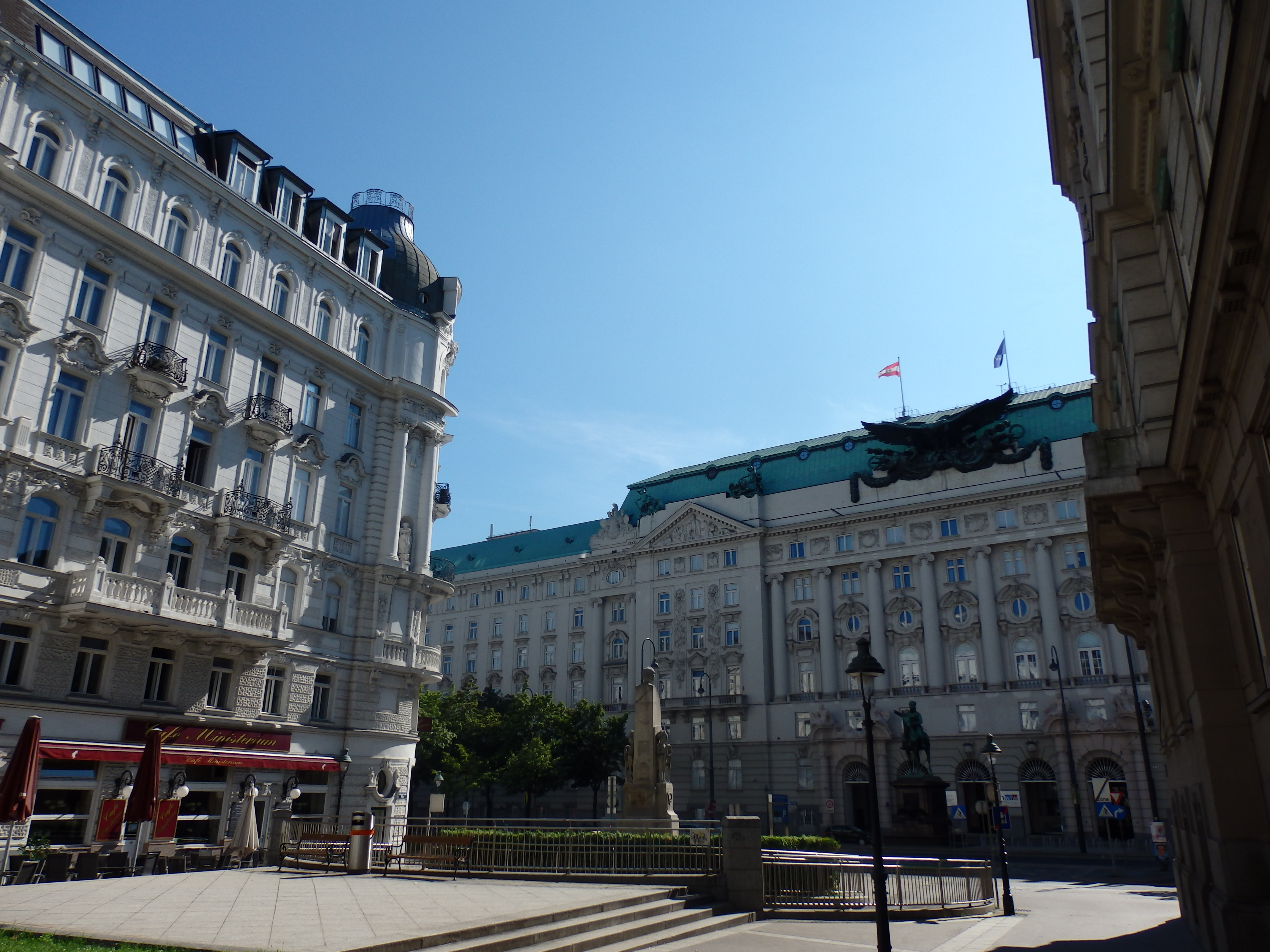 Georg-Coch-Platz von der Biberstraße aus gesehen, Wien-Innere Stadt